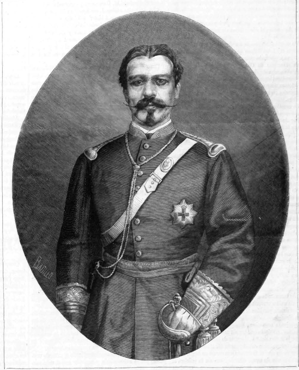 D. Juan Contreras y Martínez, jefe del regimiento de Lanceros del Rey (promovido a brigadier por el mérito que contrajo al frente de 98 jinetes en la batalla de Nanclares). La Ilustración Española y Americana, 22 de julio de 1875, dibujo de Félix Badillo